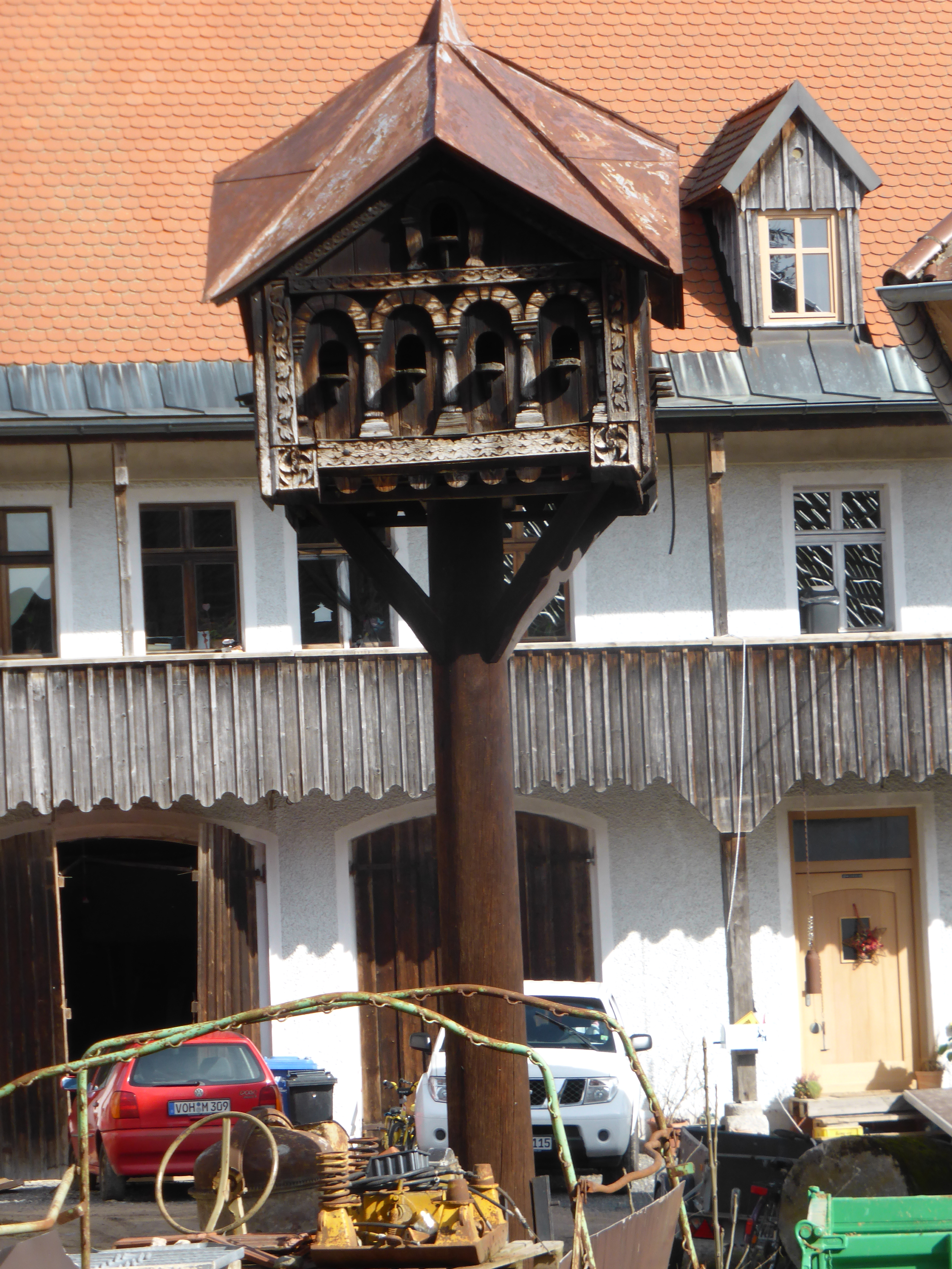 Schlösschen Roggenstein (Vohenstrauß) mit Taubenkobel 2019